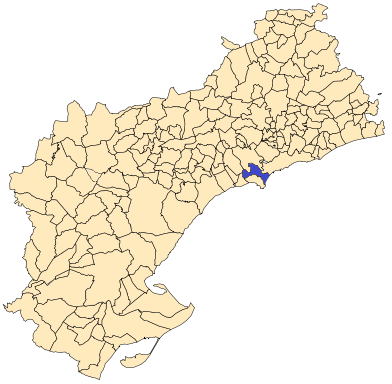 Situación de Vila-Seca en la provincia de Tarragona.